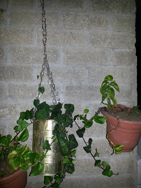 Vemos un uso distinto al que tenia la lata originalmente.